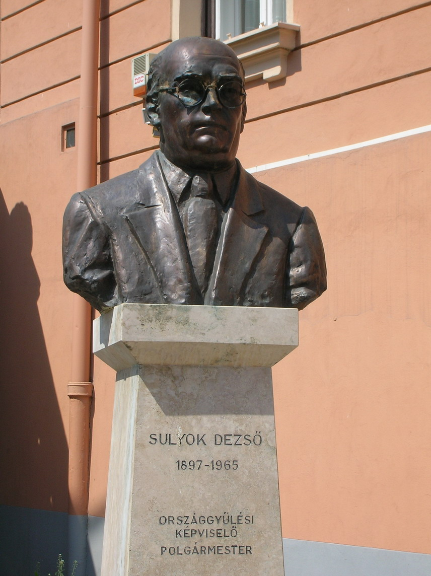 Sulyok Dezső pápai mellszobra